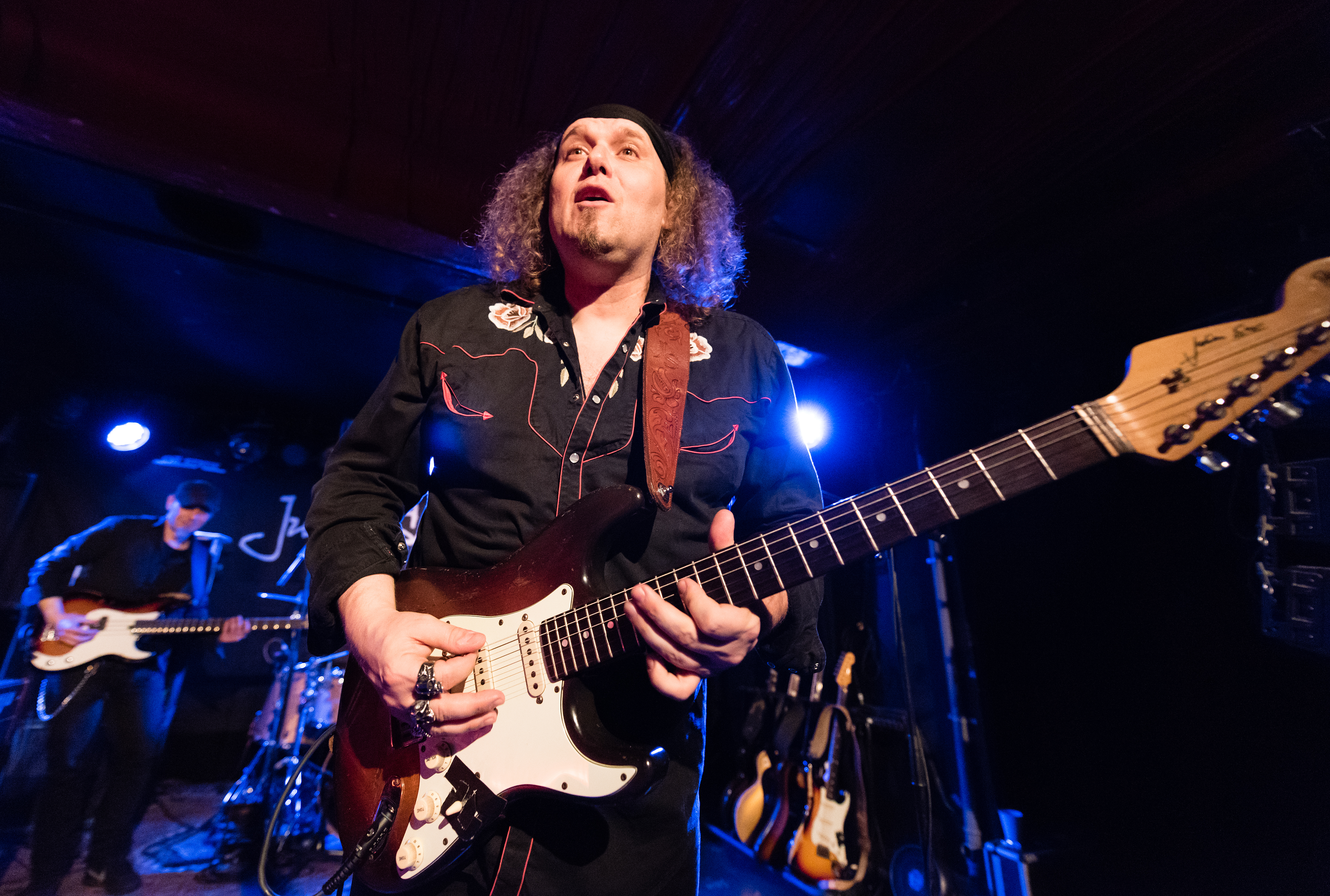 Julian Sas während der Coming Home Tour 2017 in der Markthalle Hamburg, präsentiert von onstage-promotion.de